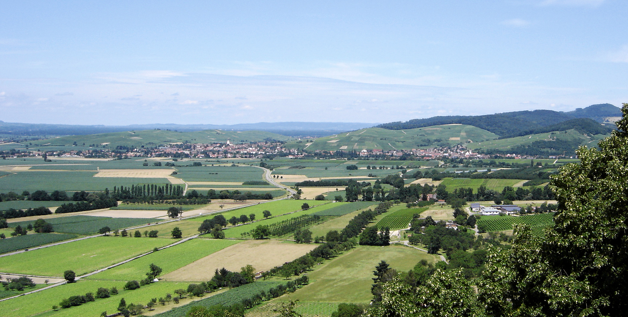 Blick von der Burg Staufen; cropped version of Staufen - Blick von der Burg 04.JPG